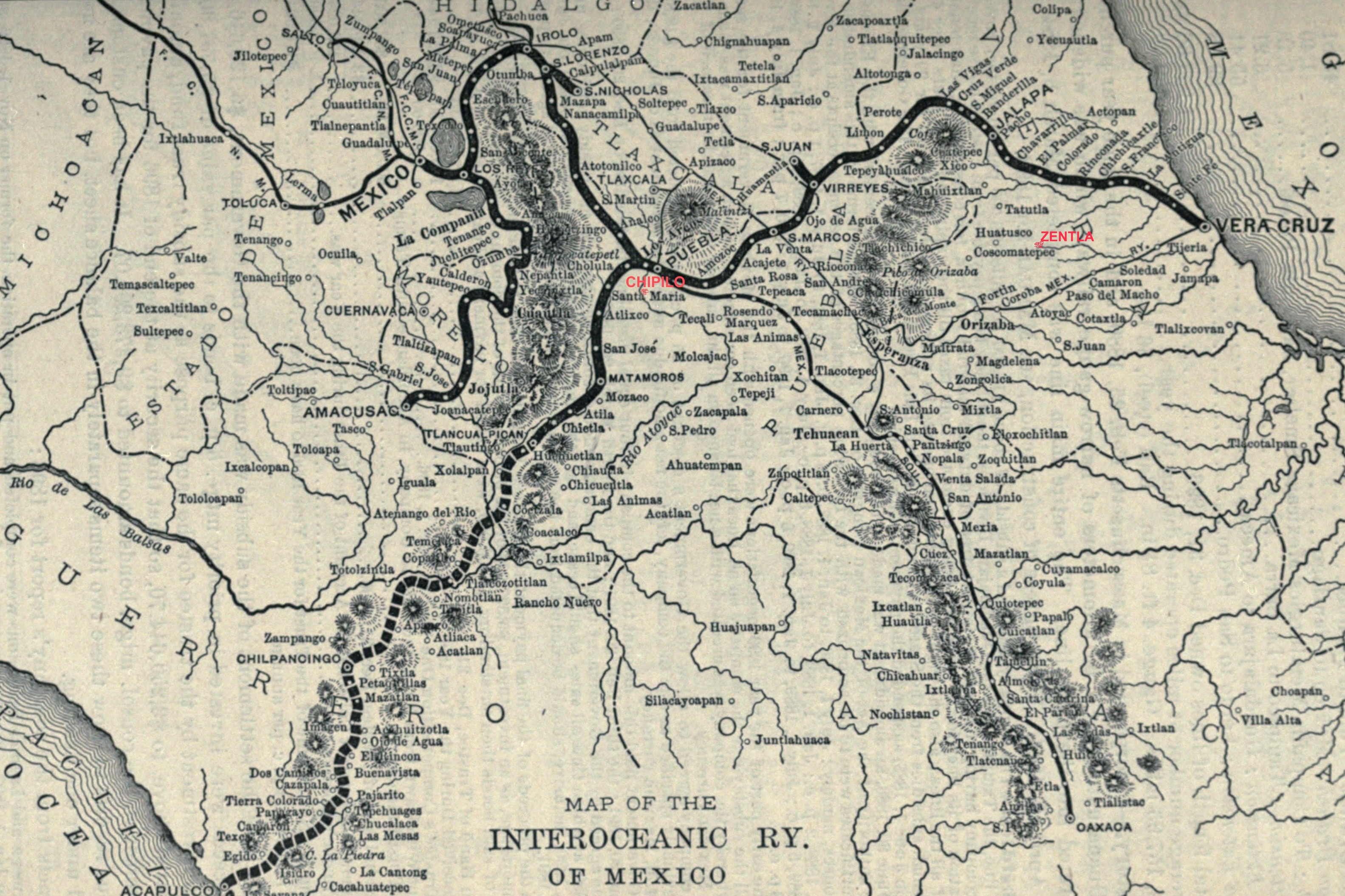 Foto digital de mapa de Mejico central en 1897. Mapa tomada de viejo libro (publicado en 1936) sobre ferrocarril transoceanico mejicano. He modificado el mapa con mi software, agregandole en rojo las ciudades de Chipilo y Zentla (donde hay comunidades descendientes de colonos italianos).